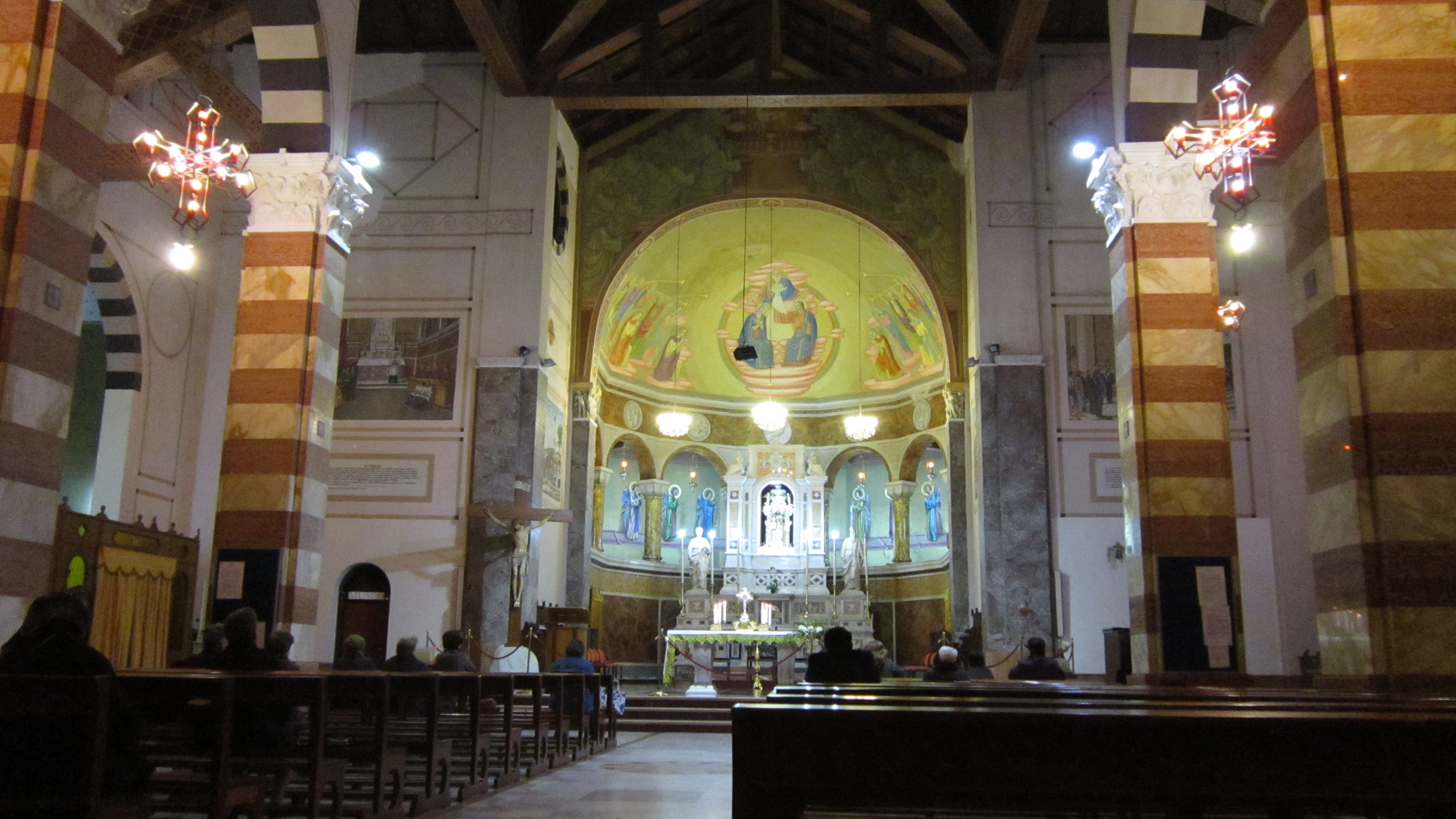 Altare centrale Basilica Madonna dei Poveri